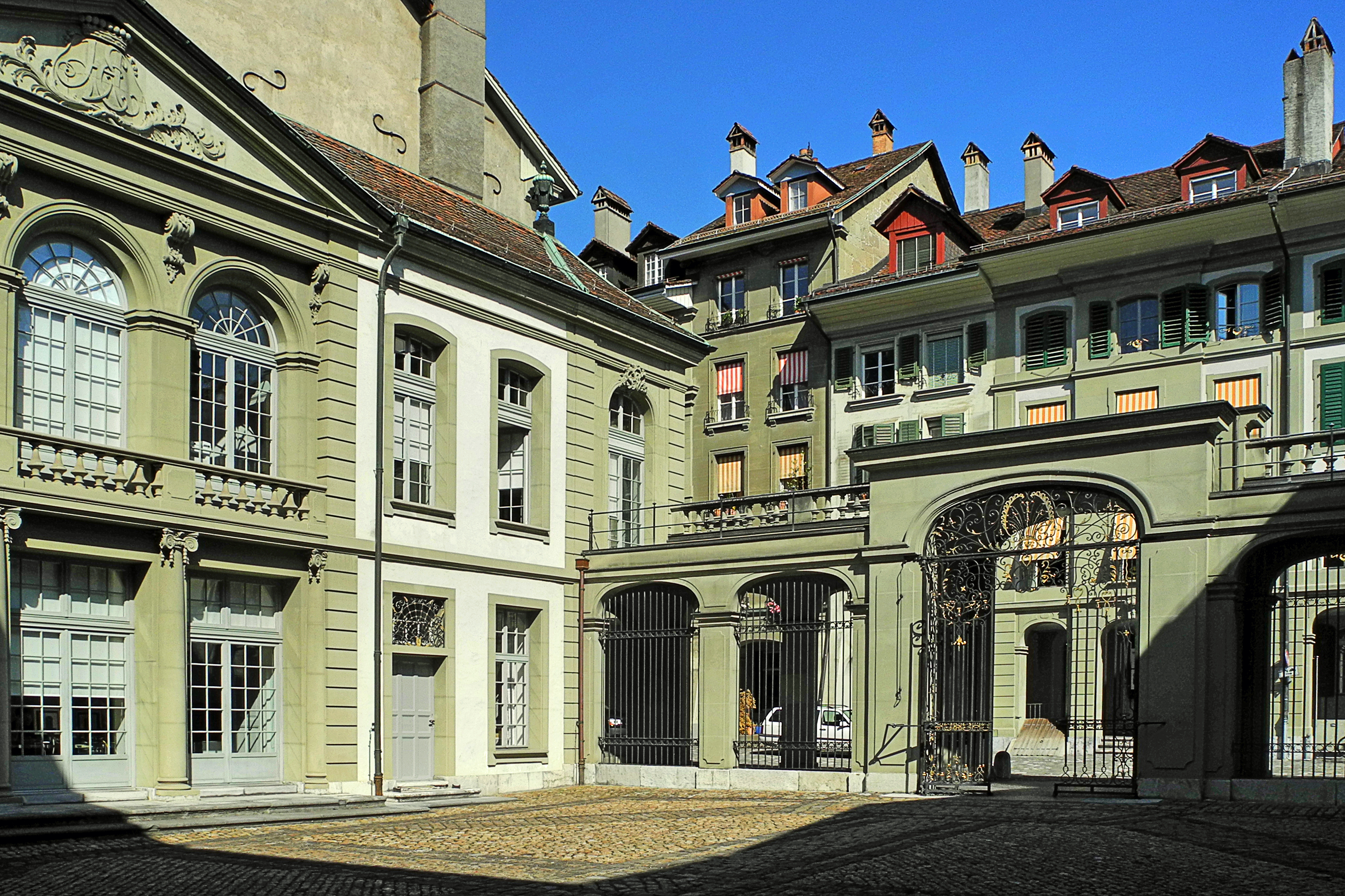 Erlacherhof an der Junkerengasse 47 in Bern, Teilansicht